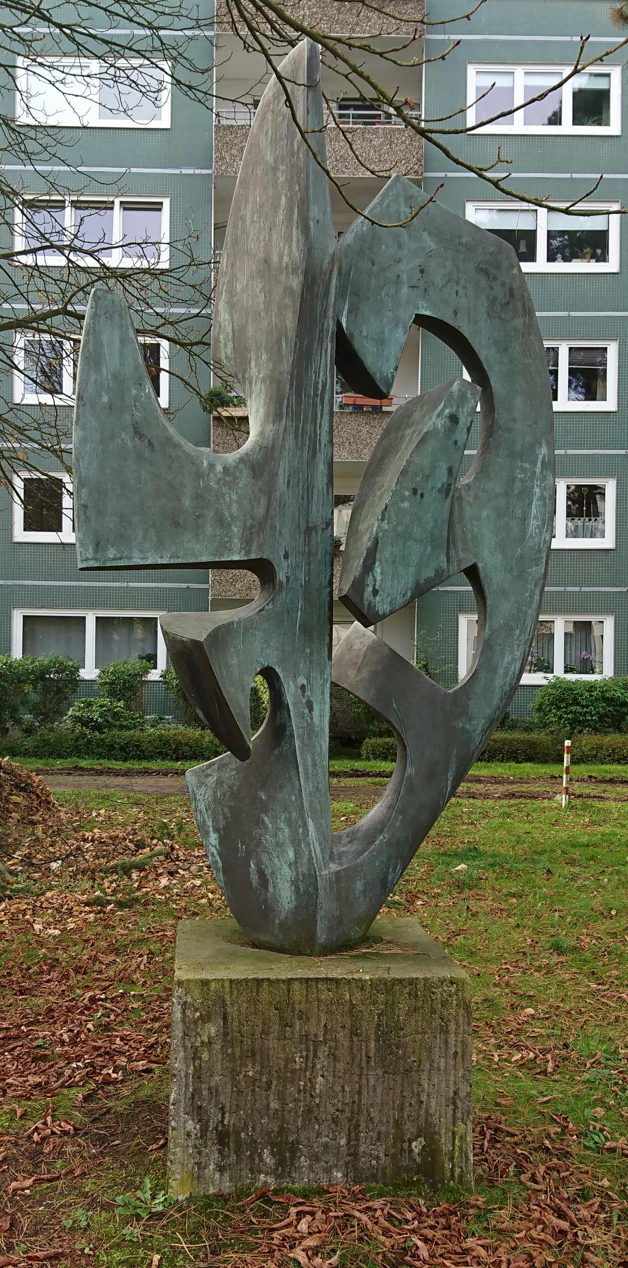 Das Blatt von Johannes Ufer (* 30. April 1912 in Essen; † 4. Januar 1987 in Hamburg). Bronzeskulptur, aufgestellt 1969. Standort: Diekmoorweg 7, Hamburg-Langenhorn. Eigentümer: meravis (vorher DAWAG).